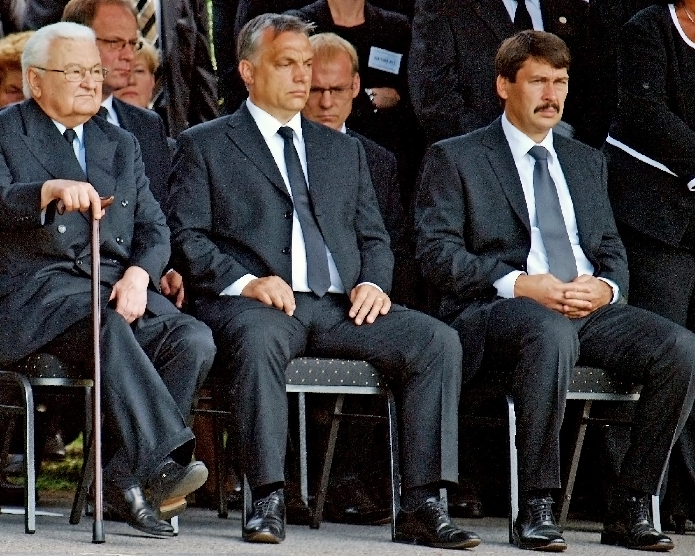 Boross Péter (balra), Orbán Viktor (középen) és Áder János (jobbra) Horn Gyula temetésén.